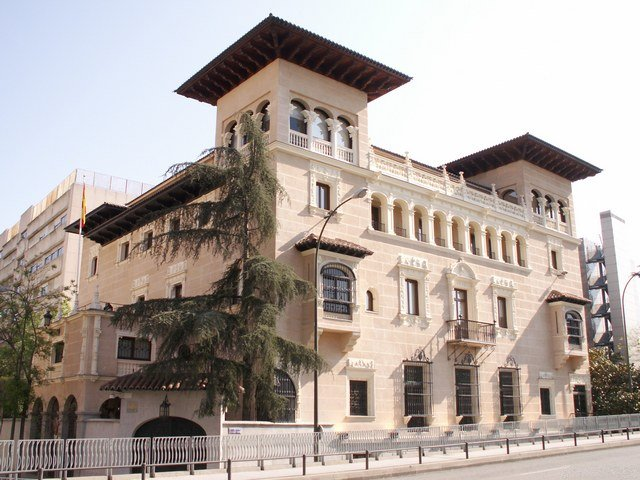 Palacio de los marqueses de Bermejillo del Rey, en Madrid (España). Paseo de Eduardo Dato, 31. Actual sede del Defensor del Pueblo de España. Obra de Eladio Laredo Carranza construida de 1913 a 1916.